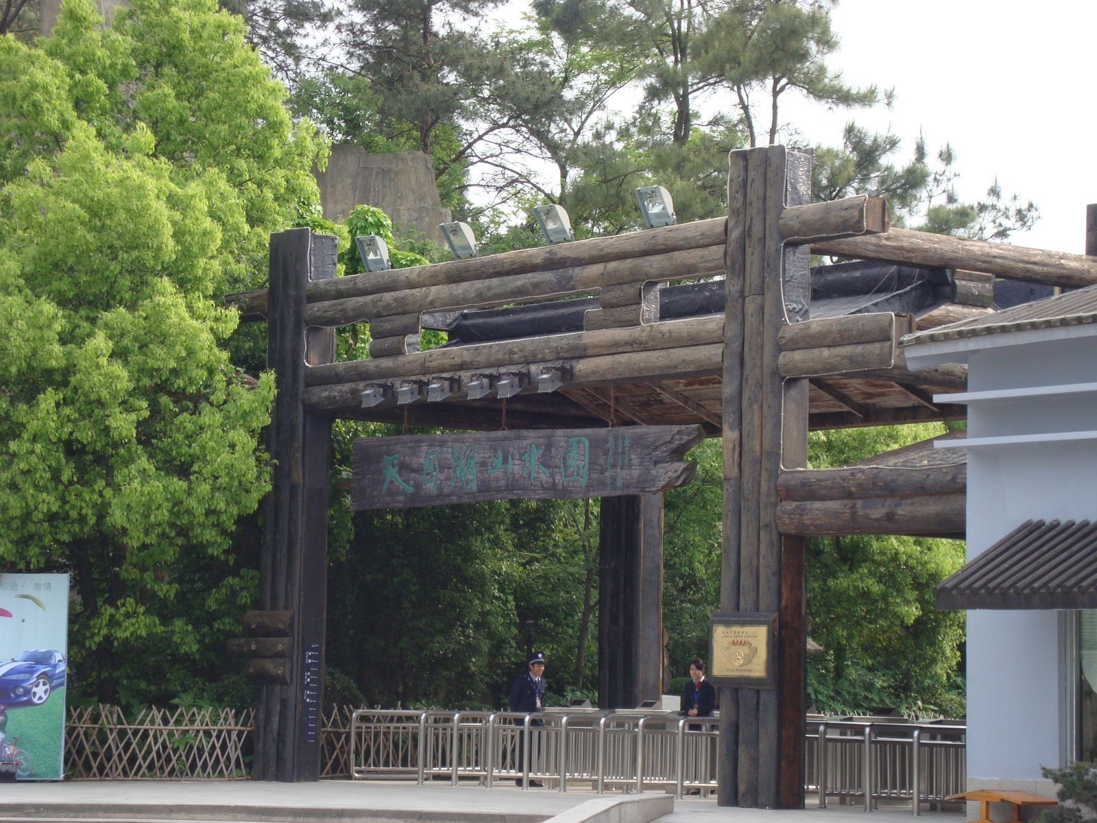 中文（中国大陆）: 江蘇溧陽 天目湖景區大門